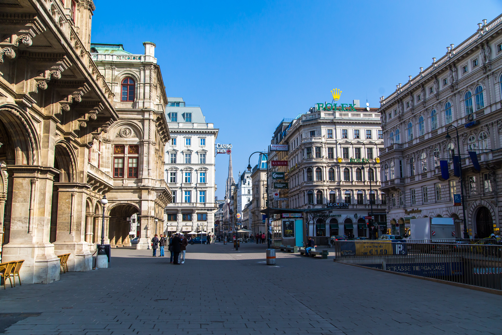 Innere Stadt, 1010 Vienna, Austria